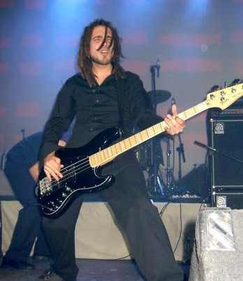 Pablo Valero Bajista desde 2005